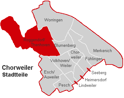 Lagekarte Roggendorf/Thenhoven im Stadtbezirk Köln-Chorweiler